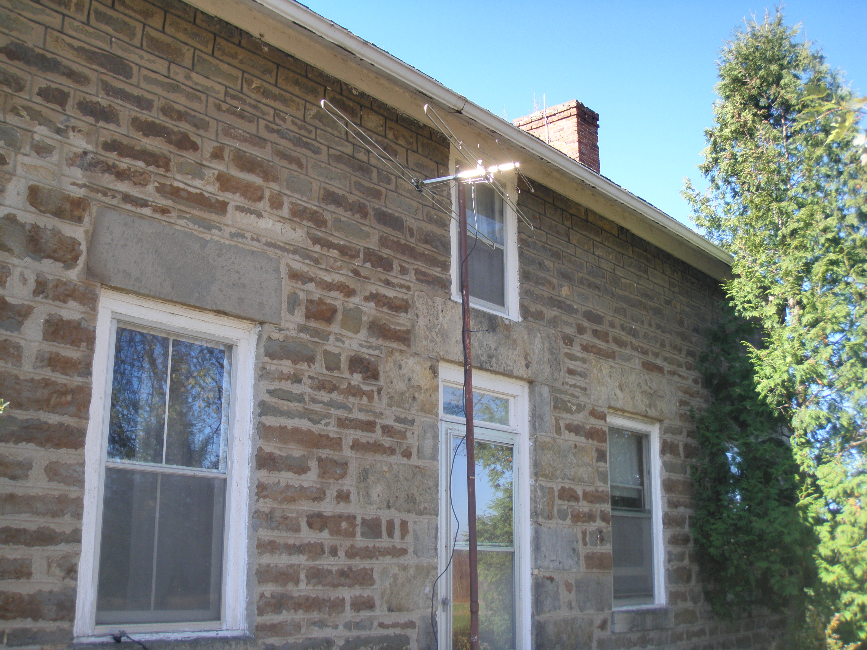 television antenna